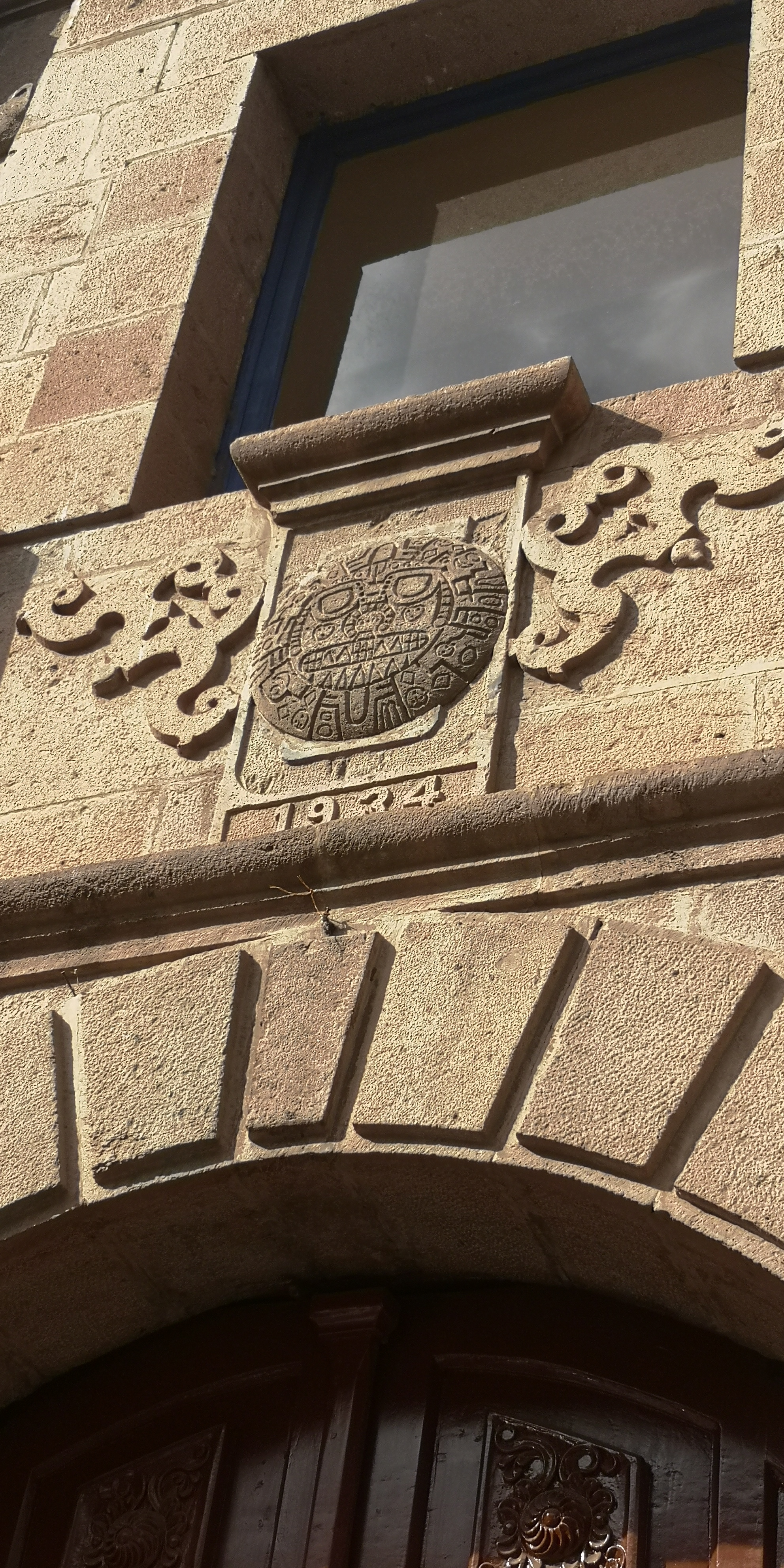 Vista de la superposición del actual escudo del Cusco sobre el antiguo en la puerta lateral del Palacio del Cabildo del Cusco, Perú